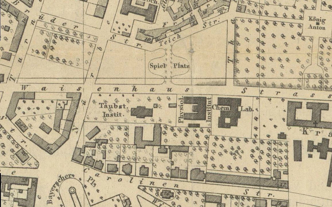 Ausschnit aus: Leipzig, 1:7 000, Kupferstich, 1871 - Südöstliche Vorstadt